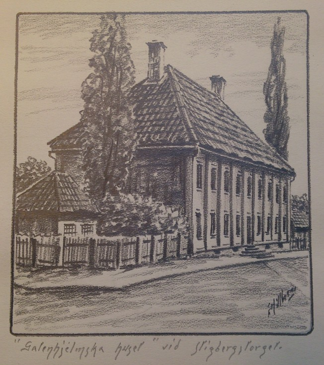 Kolteckning av Einar Hillberg föreställande Gathenhielmska huset i Göteborg